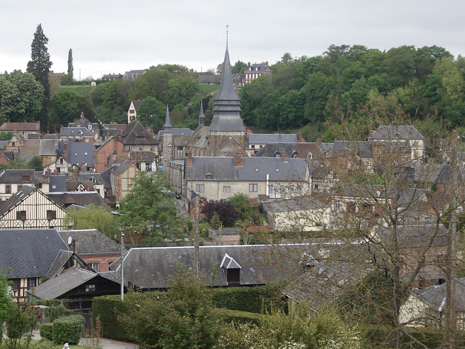 Ville de Broglie (Eure, 27)